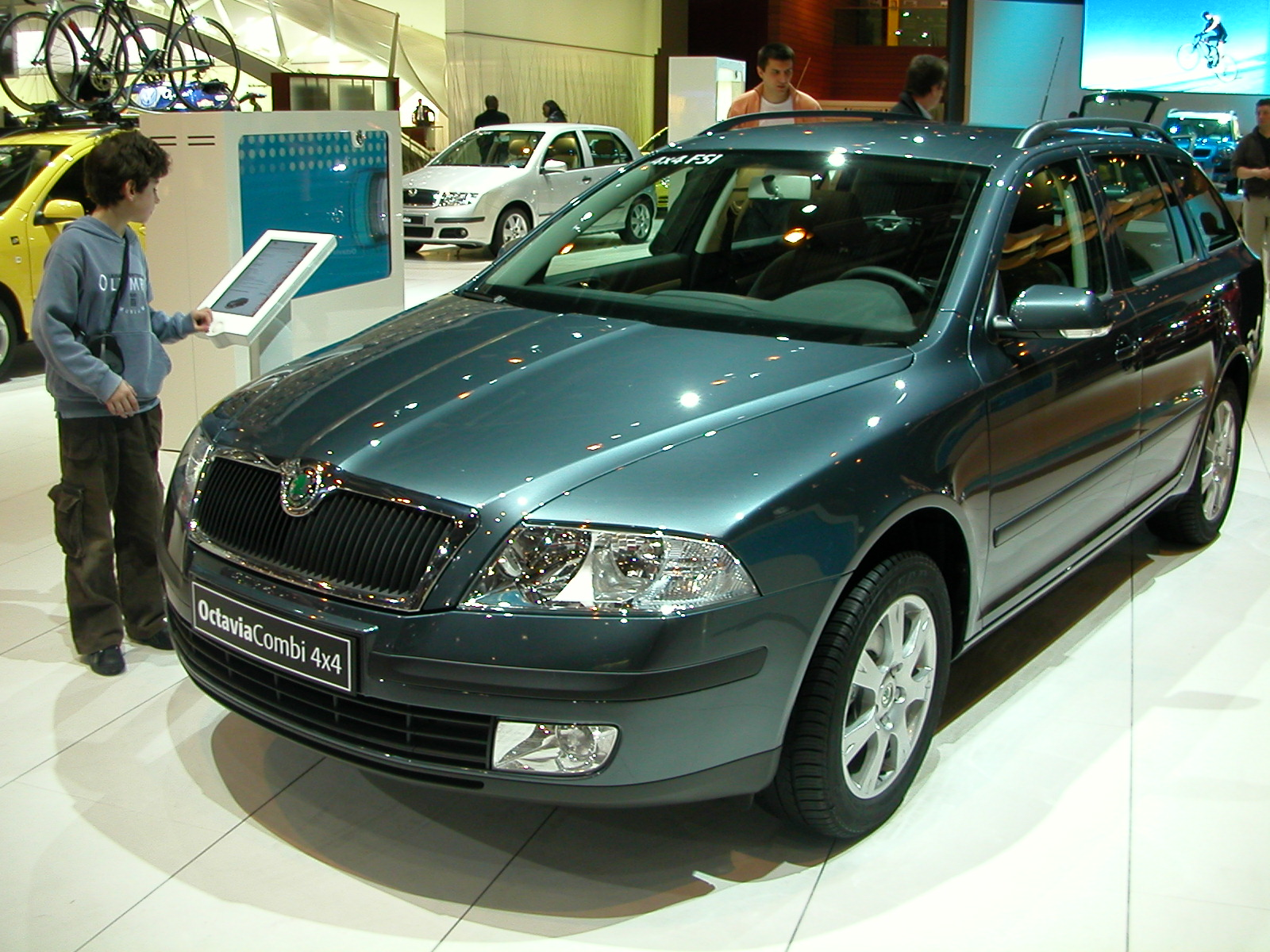 Škoda Octavia II Combi 4 x 4 FSI in Genewa 2005Skoda Octavia Combi 4x4